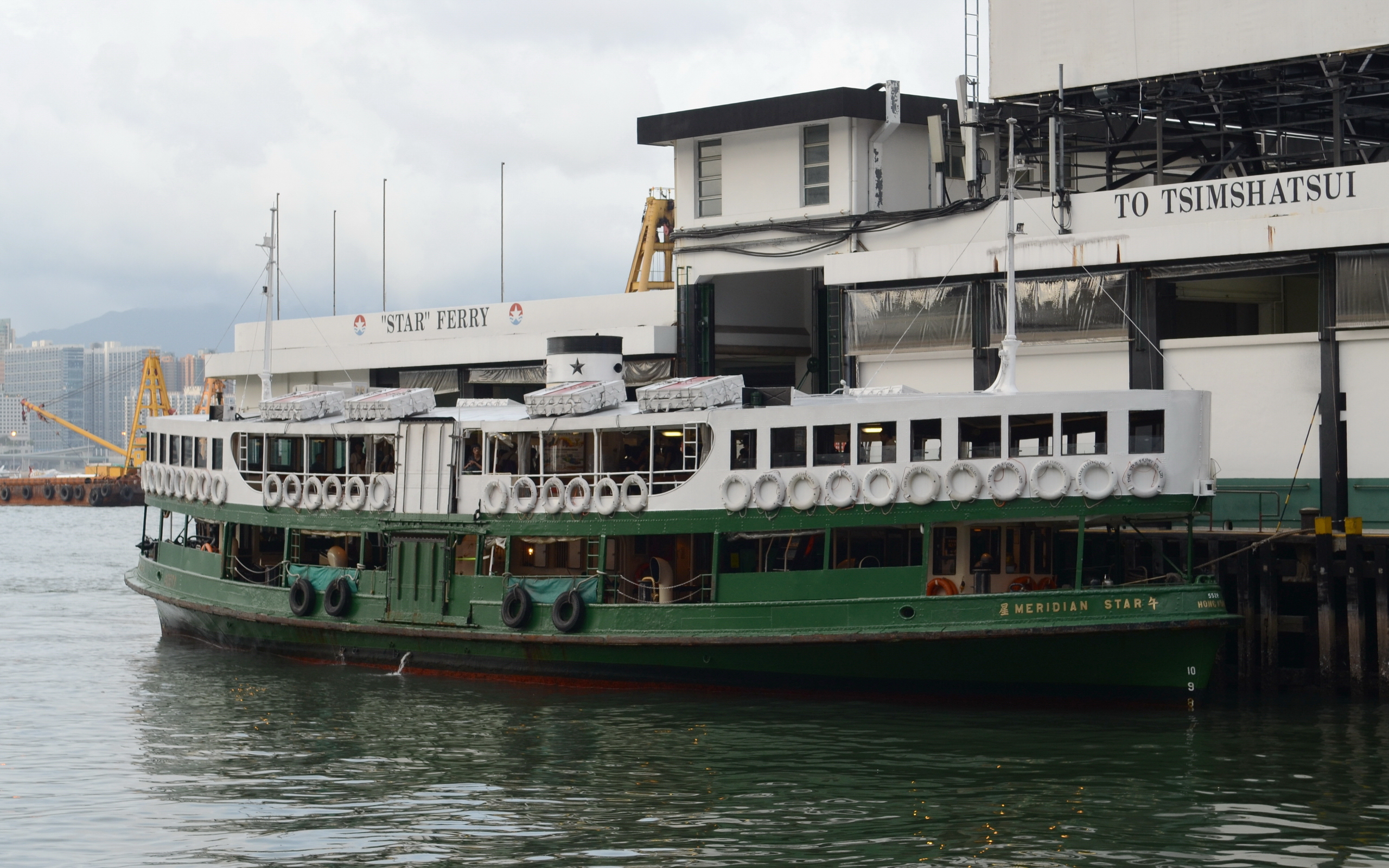 天星小轮 午星